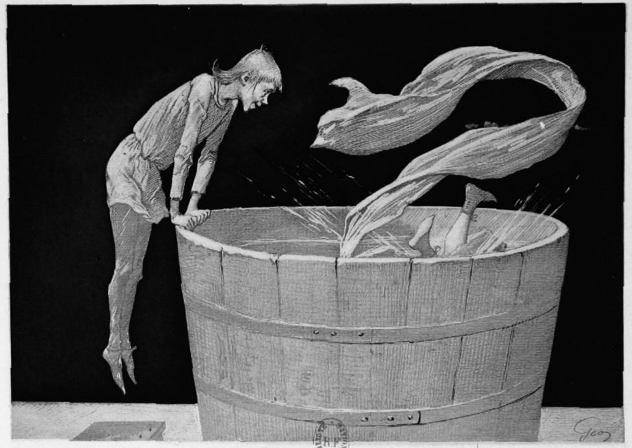 illustration pour "La Farce du Cuvier"